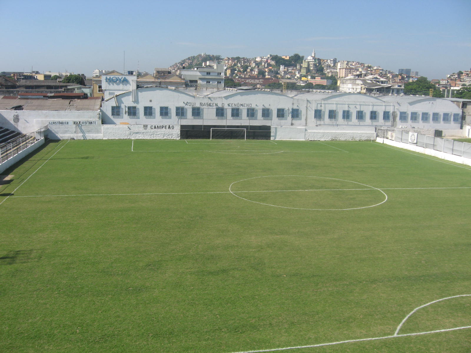 Vista do estádio Figueira de Melo, do São Cristóvão de Futebol e Regatas.